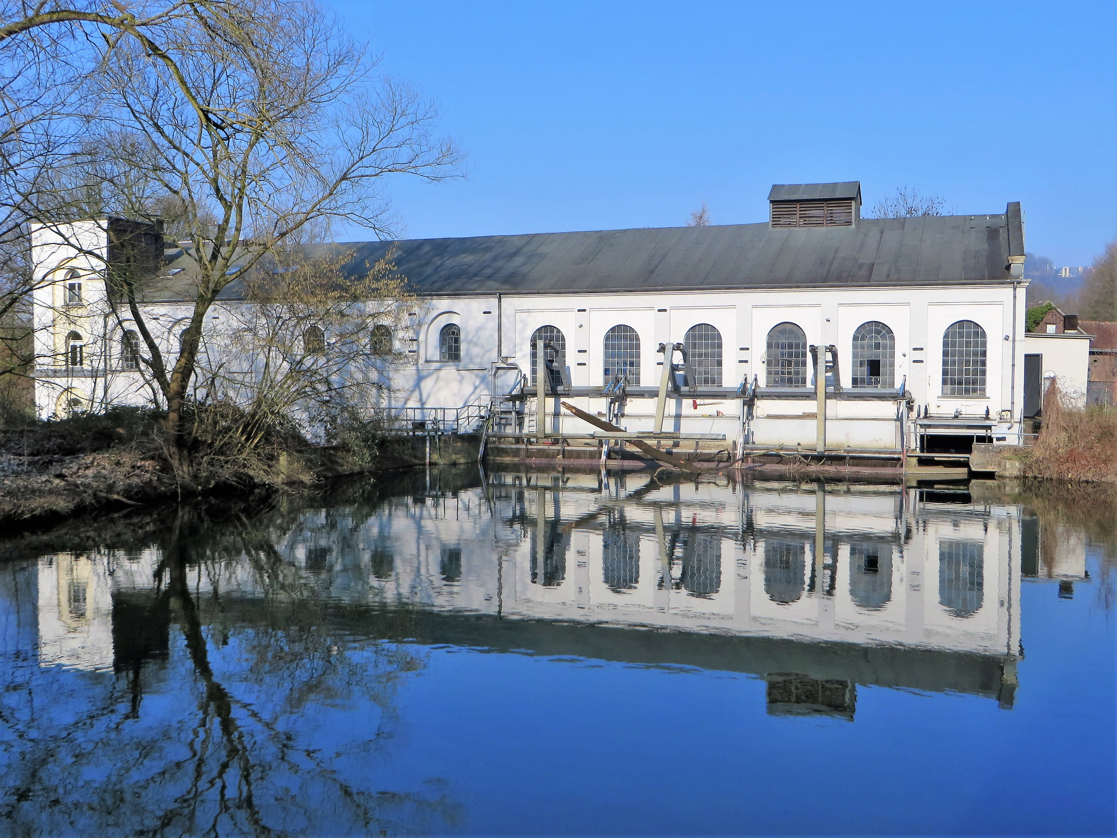 Laufwasserkraftwerk Buschmühle in Hagen-Garenfeld, Ruhrtalstraße. Ehemalige historische denkmalgeschützte Wassermühle. Der Wasserlauf „Kuckucksstrang“ im Vordergrund ist ein seitlicher Altarm der Lenne. This is a photograph of an architectural monument. + 140